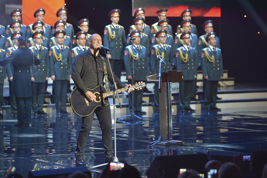 Выступление Дениса Майданова на концерте для сотрудников Главного Военно-медицинского управления Минобороны России, посвящённом Дню медицинского работника